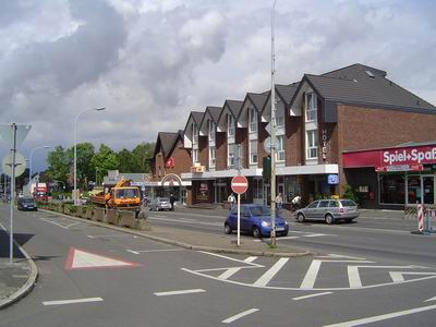 Dormagenerstraße Niederaußem by Tobias Sckerl